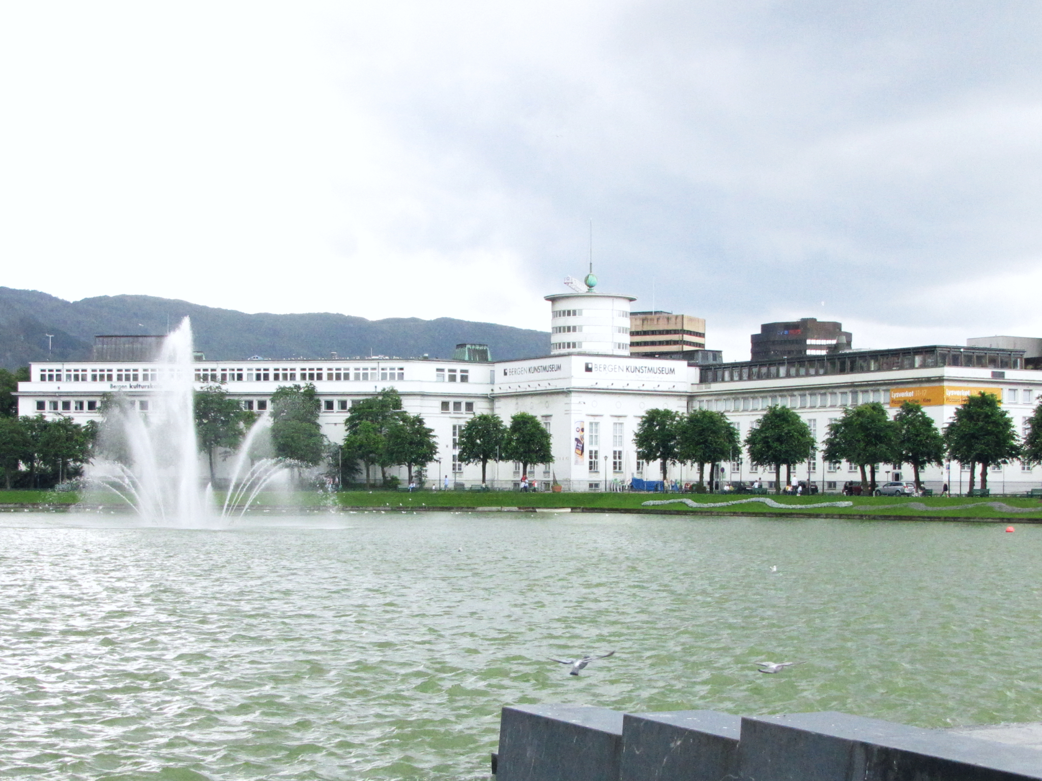 Das Kunstmuseum in Bergen in Norwegen Foto Wolfgang Pehlemann IMG_8922